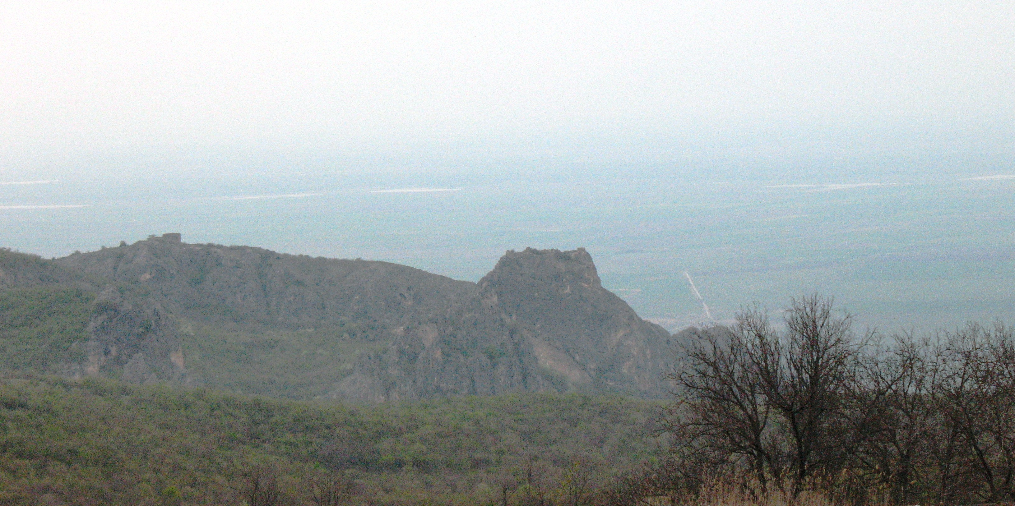 ხორნაბუჯის ციხე